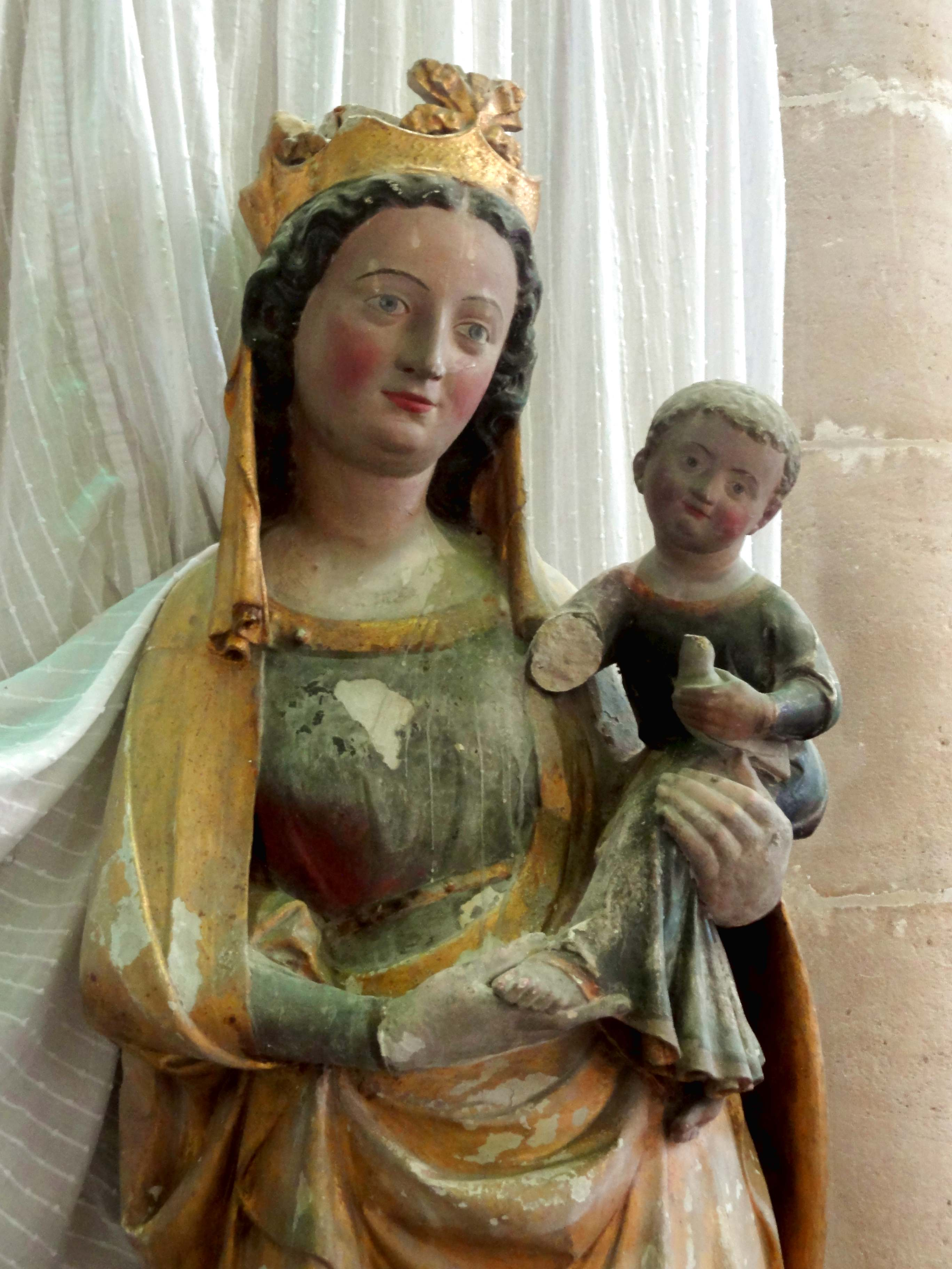 Mobilier de l'église - voir titre.